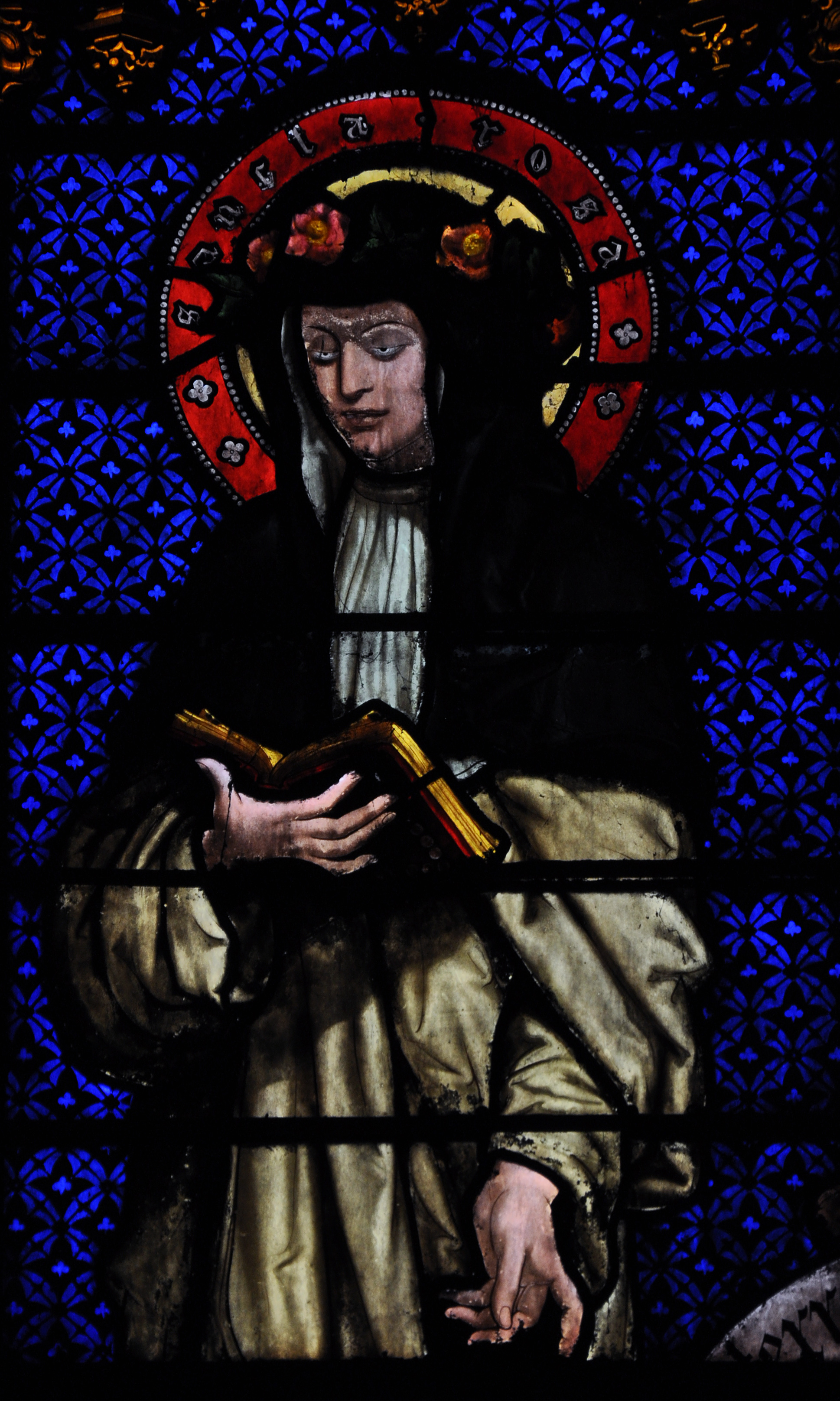 Vitrail de l'église Saint-Martin à Metz: Sainte Rose de Lima.